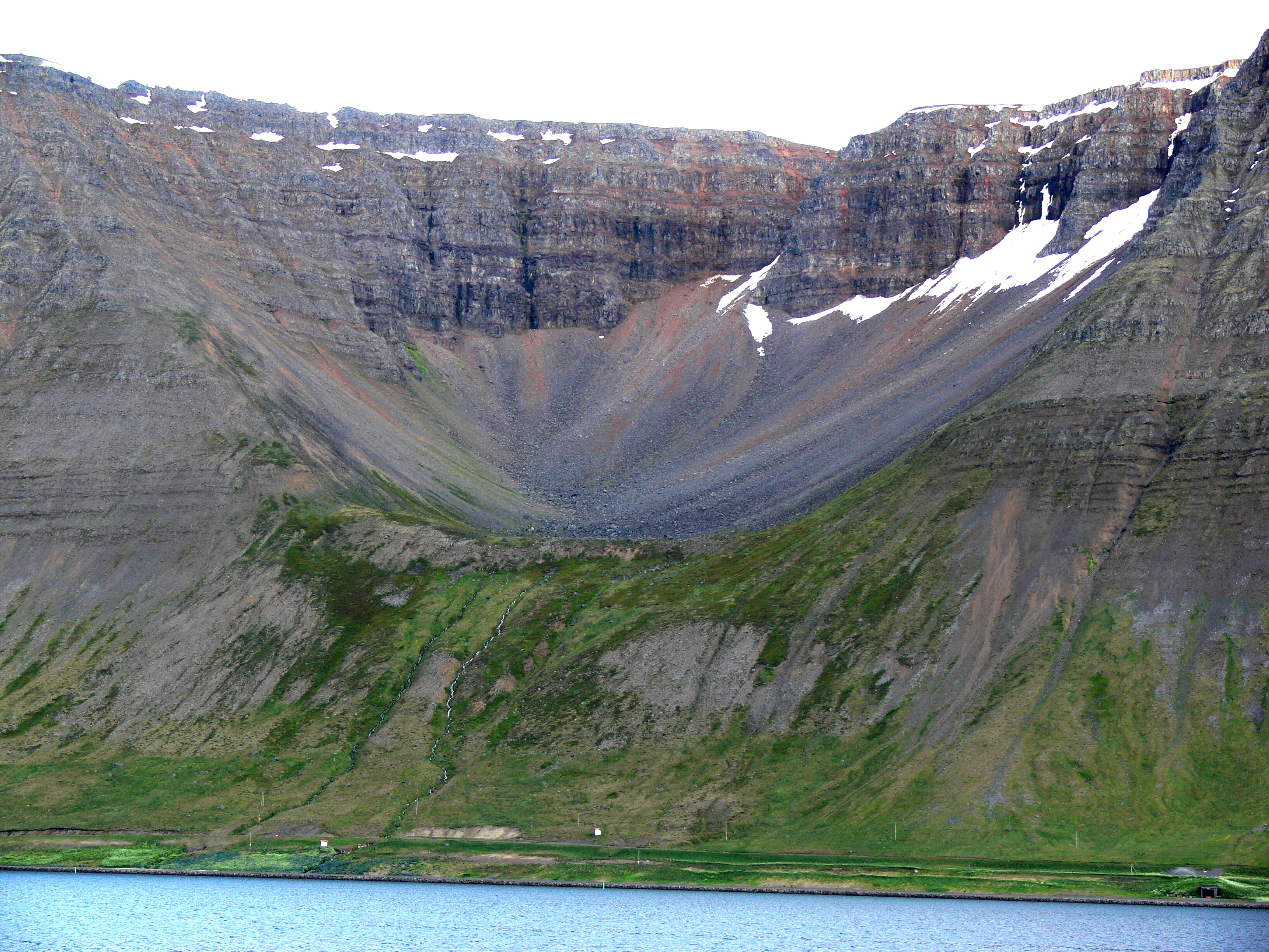 Eyrarfjall im Skutulsfjörður, einem Seitenarm des Ísafjarðardjúp.